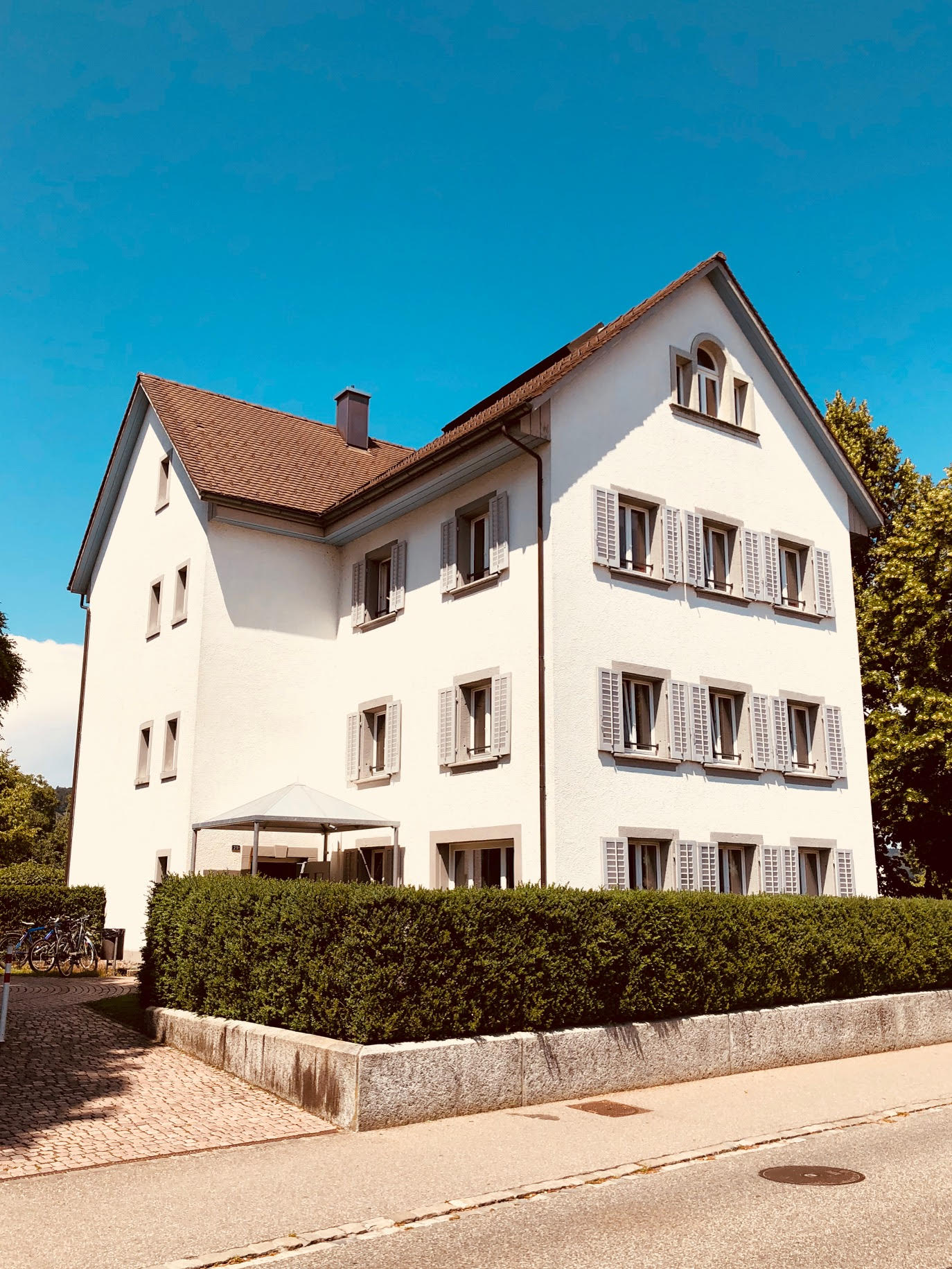 Altes Schuelhuesli (Windisch)